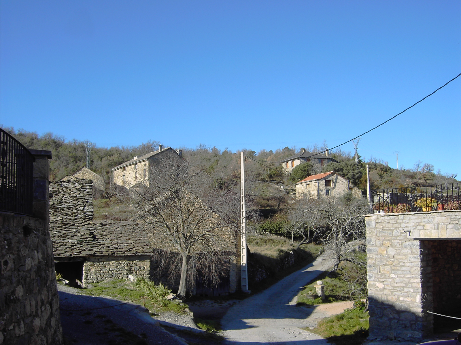 El lugar de Castellazo, en el Biello Sobrarbe. Actualmente pertenece al municipio de l'Aínsa-Sobrarbe (Huesca)